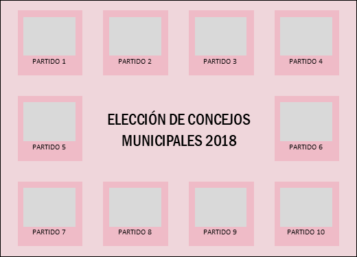 Modelo papeleta de votación elección 2018 para concejos municipales de El Salvador